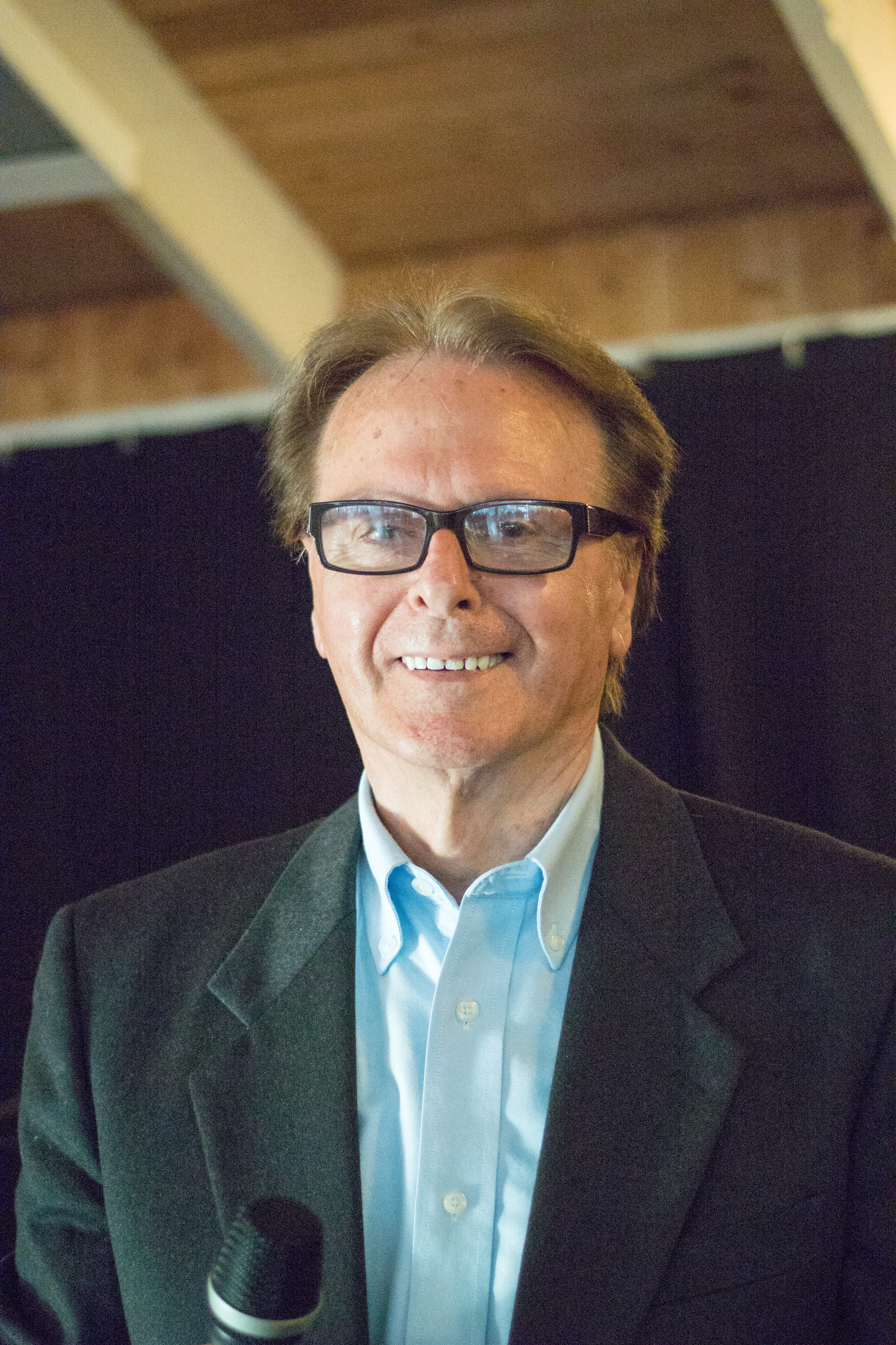 Umberto Marcato